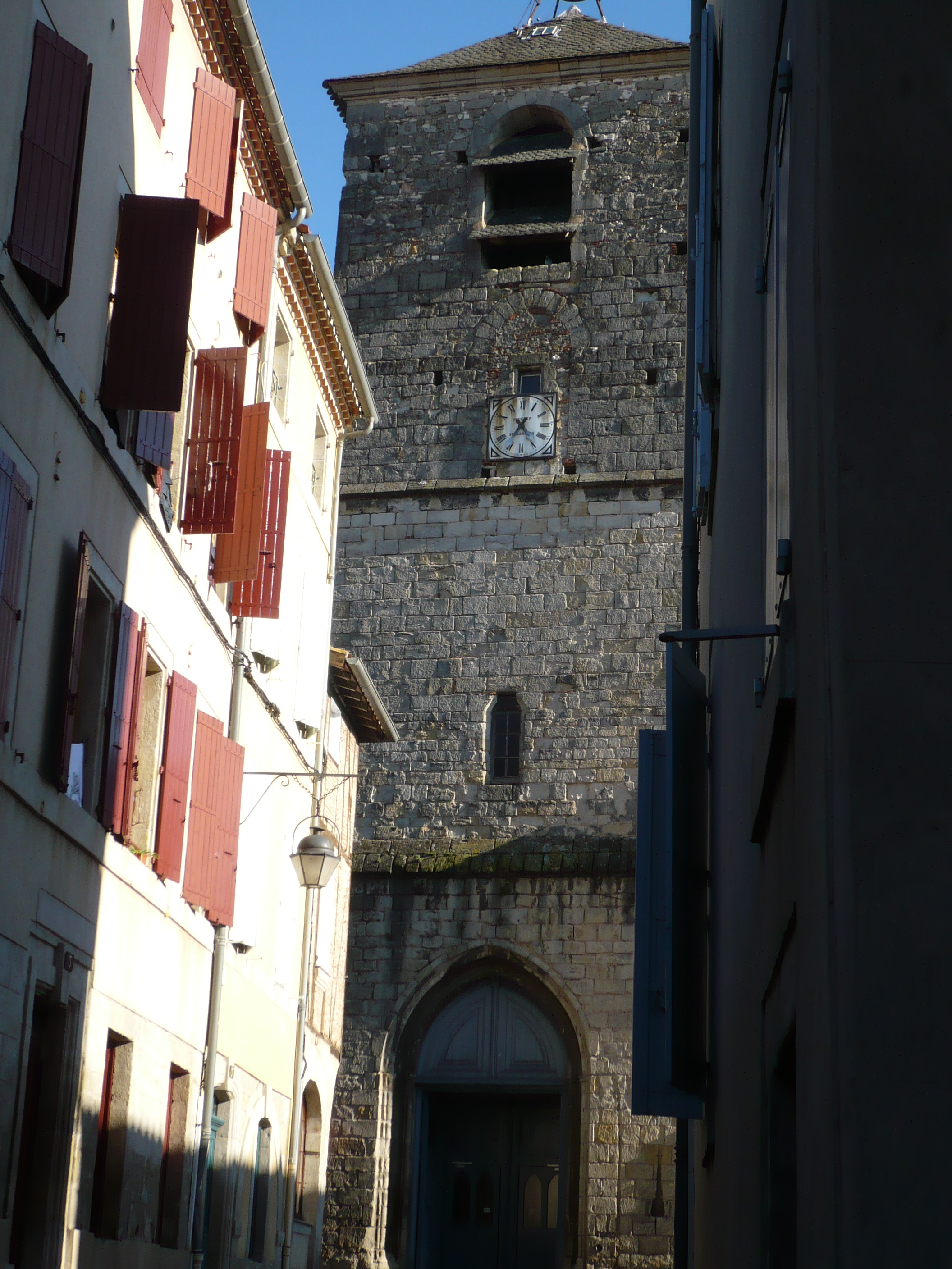 Castres